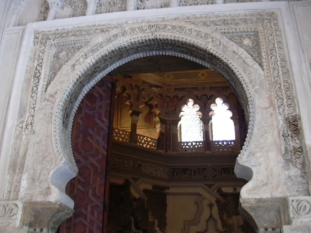 La Aljafería - Oratorio mususlmán